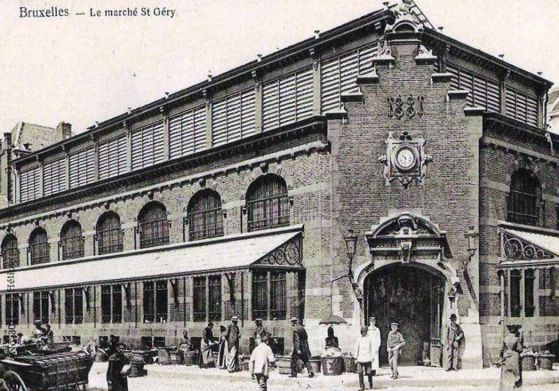 Les halles Saint-Géry vers 1890